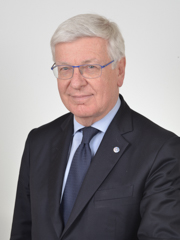 Senatore Paolo Romani - XVIII Legislatura